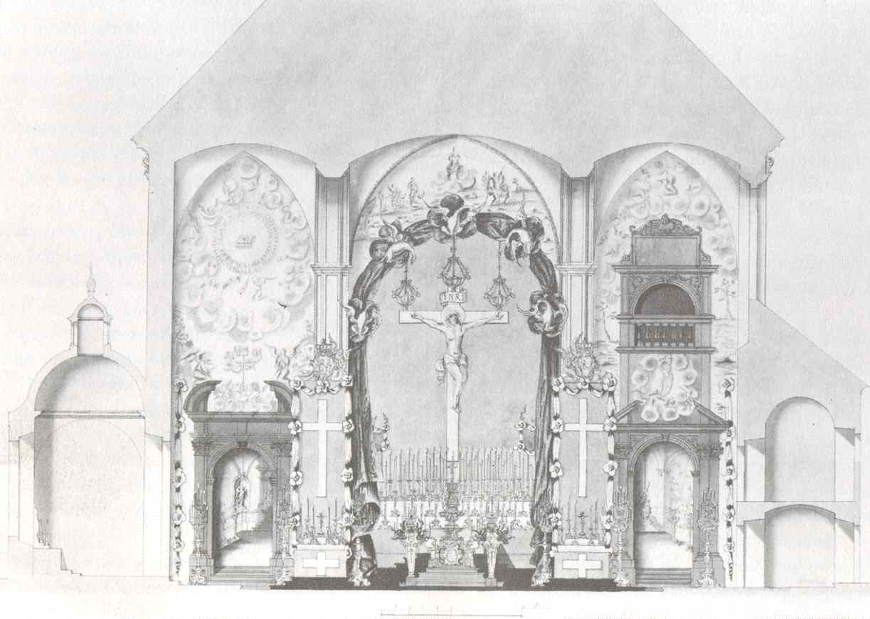 Aufbahrung Augusts des Starken 1733 in Warschau